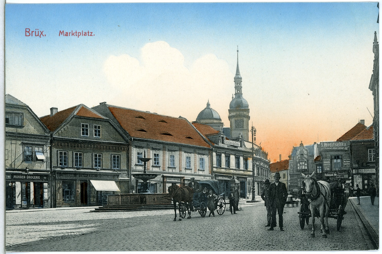 Brüx; Marktplatz This postcard is from publisher Brück & Sohn in Meißen ( This postcard has a unique number 13942 and is available in a higher resolution at the publisher. This images was uploaded in a cooperation project between Wikipedians and the publisher.